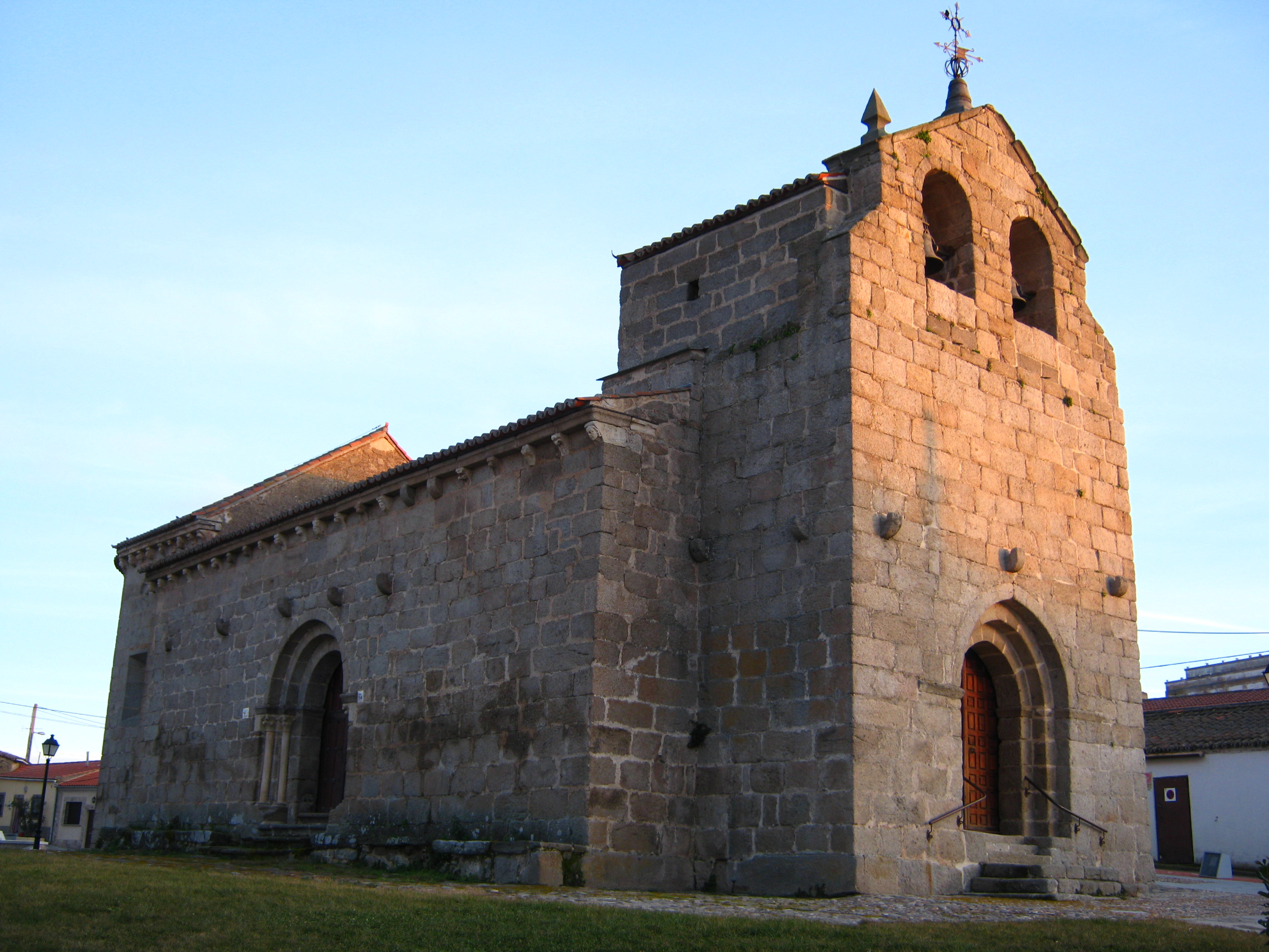 Iglesia de Santa Elena, en Ledesma (provincia de Salamanca)